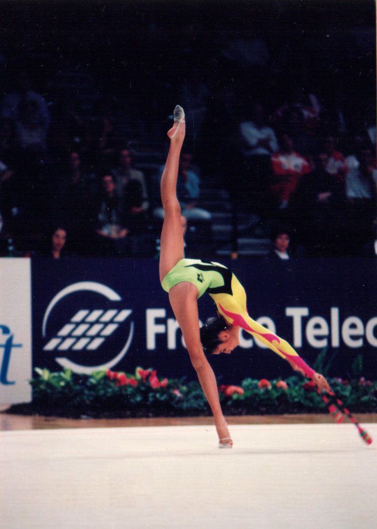 La gimnasta española Almudena Cid en el Mundial de Viena en 1995.